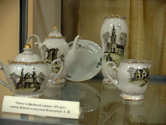 Добруш. Добрушскі раённы краязнаўчы музей.